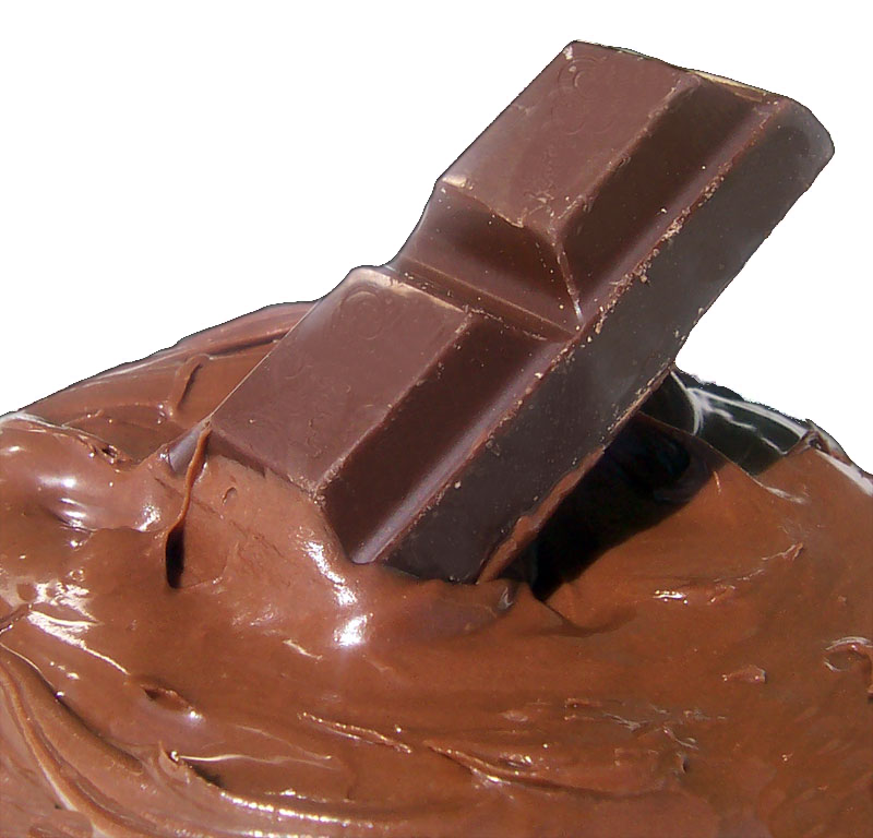 Ajout d'une transparence